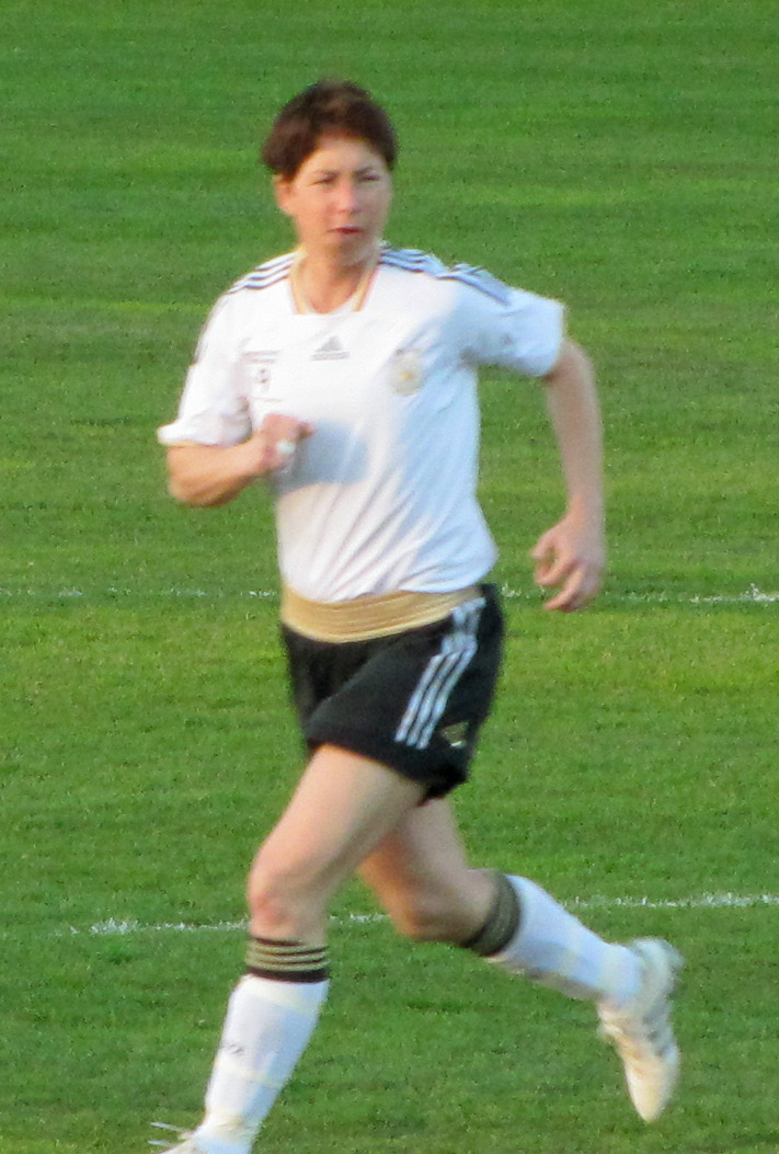 DFB-Abschiedsspiel für Birgit Prinz im Volksbank-Stadion in Ffm. Maren Meinert.